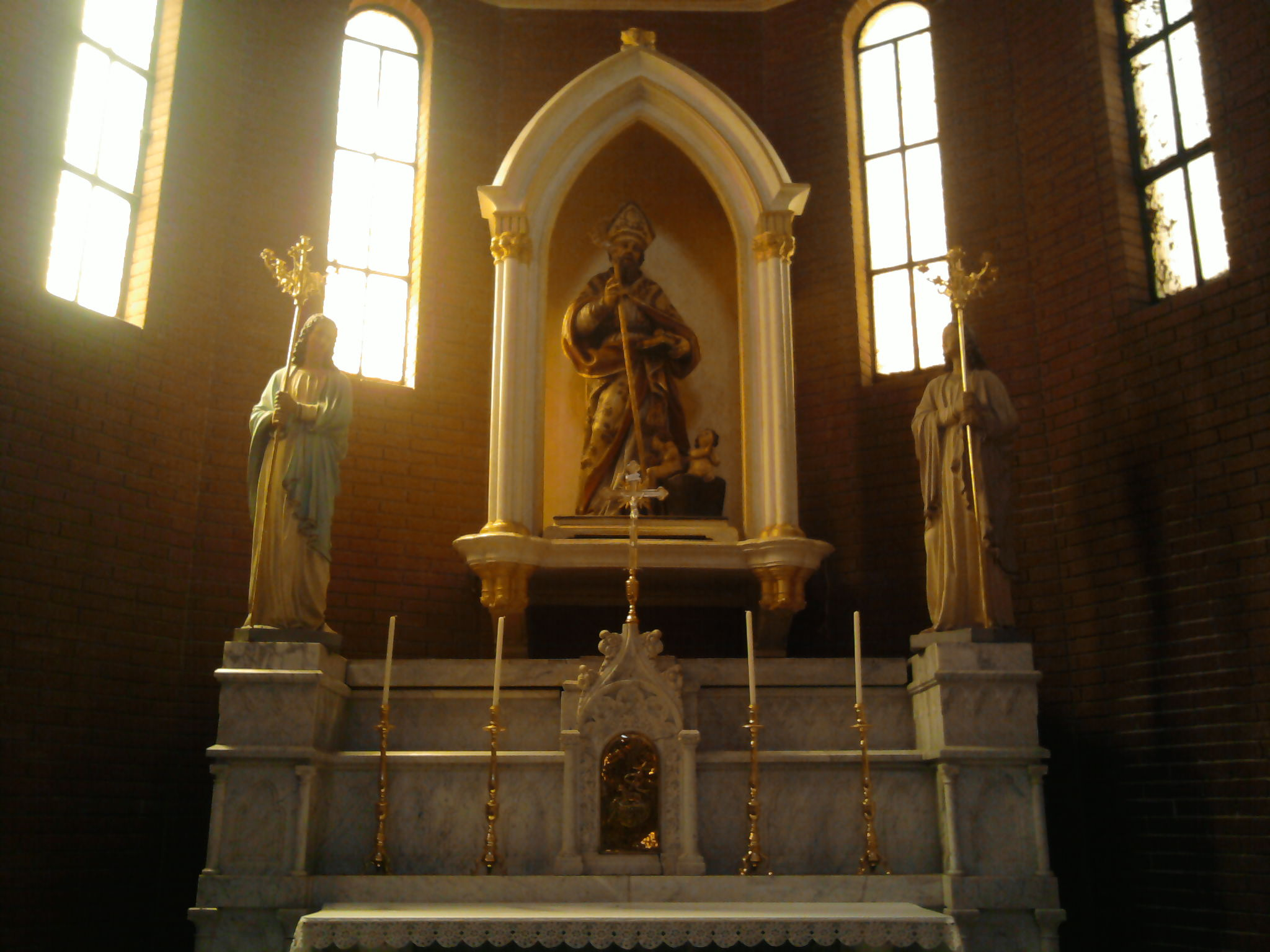 Statua di San Nicola collocata nella omonima Concattedrale di Palmi